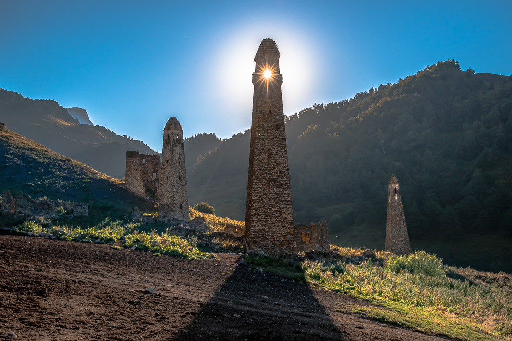 Башни в древнем ингушском городе Ний (Джейрахский район, Ингушетия)